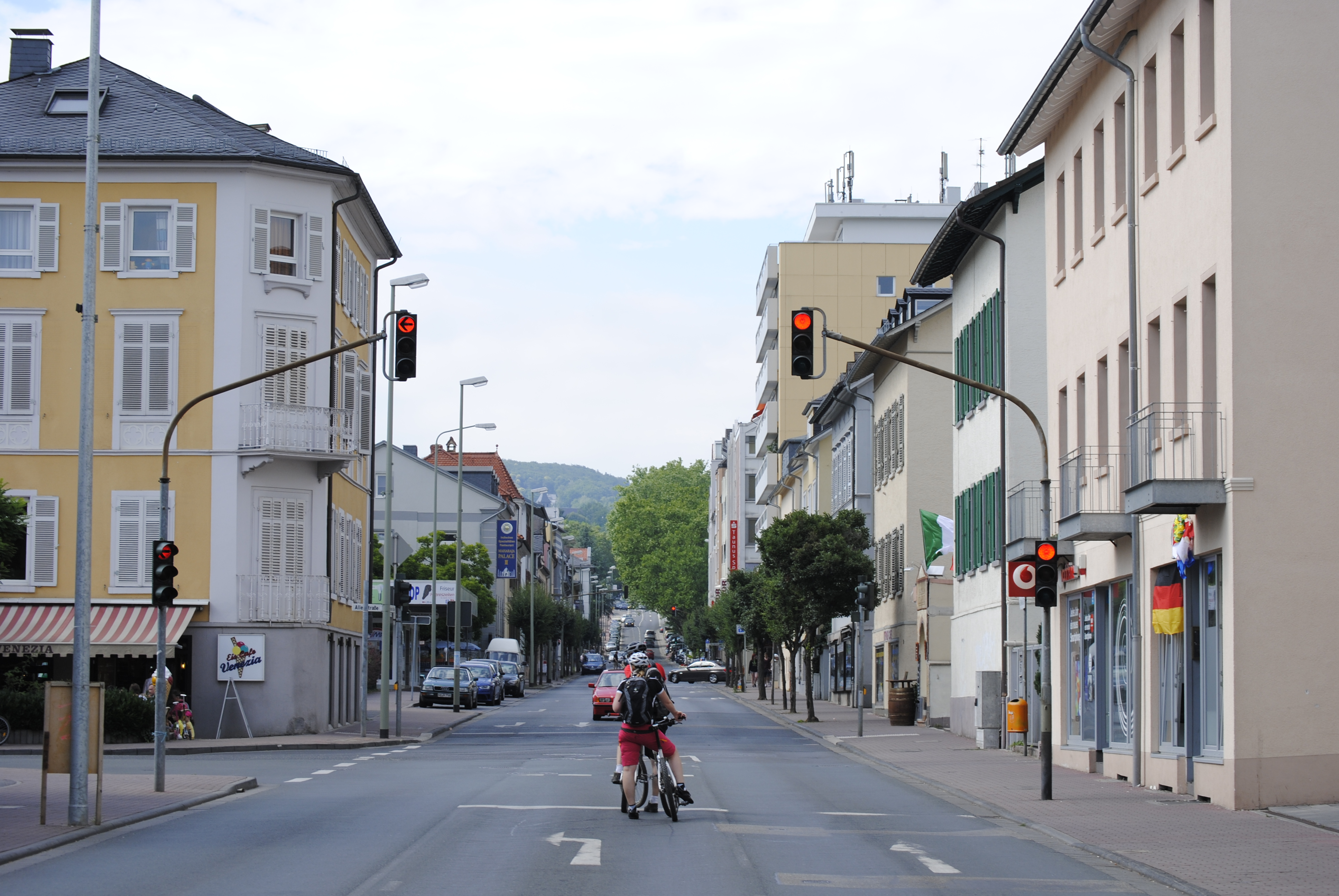 Blick in die Königsteiner Straße Ecke Alleestraße